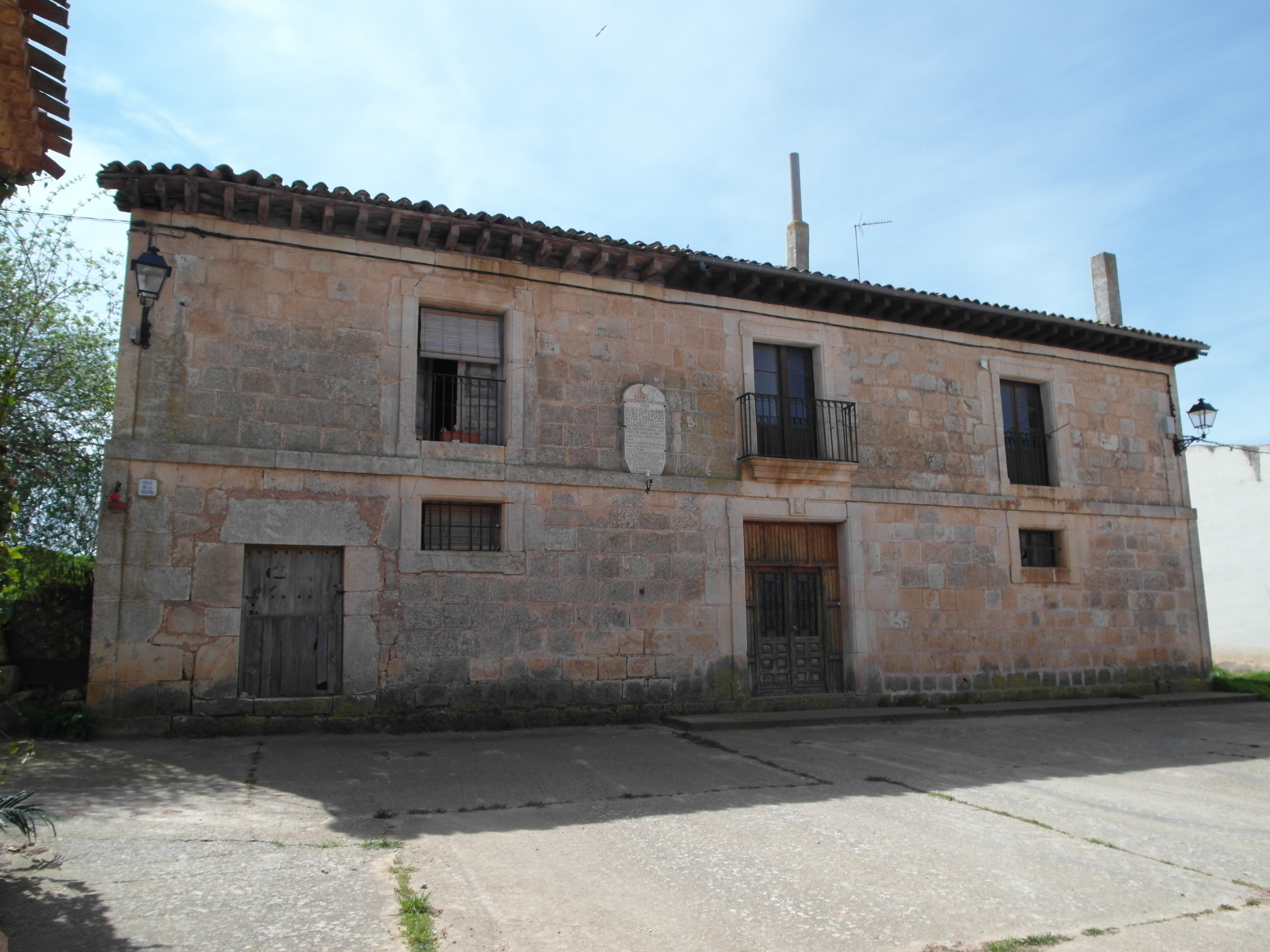 Villoviado, Burgos.